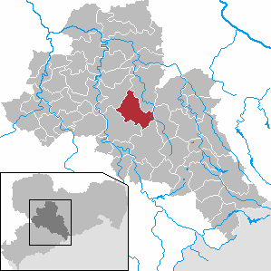 Hainichen in Saxony - district Mittelsachsen